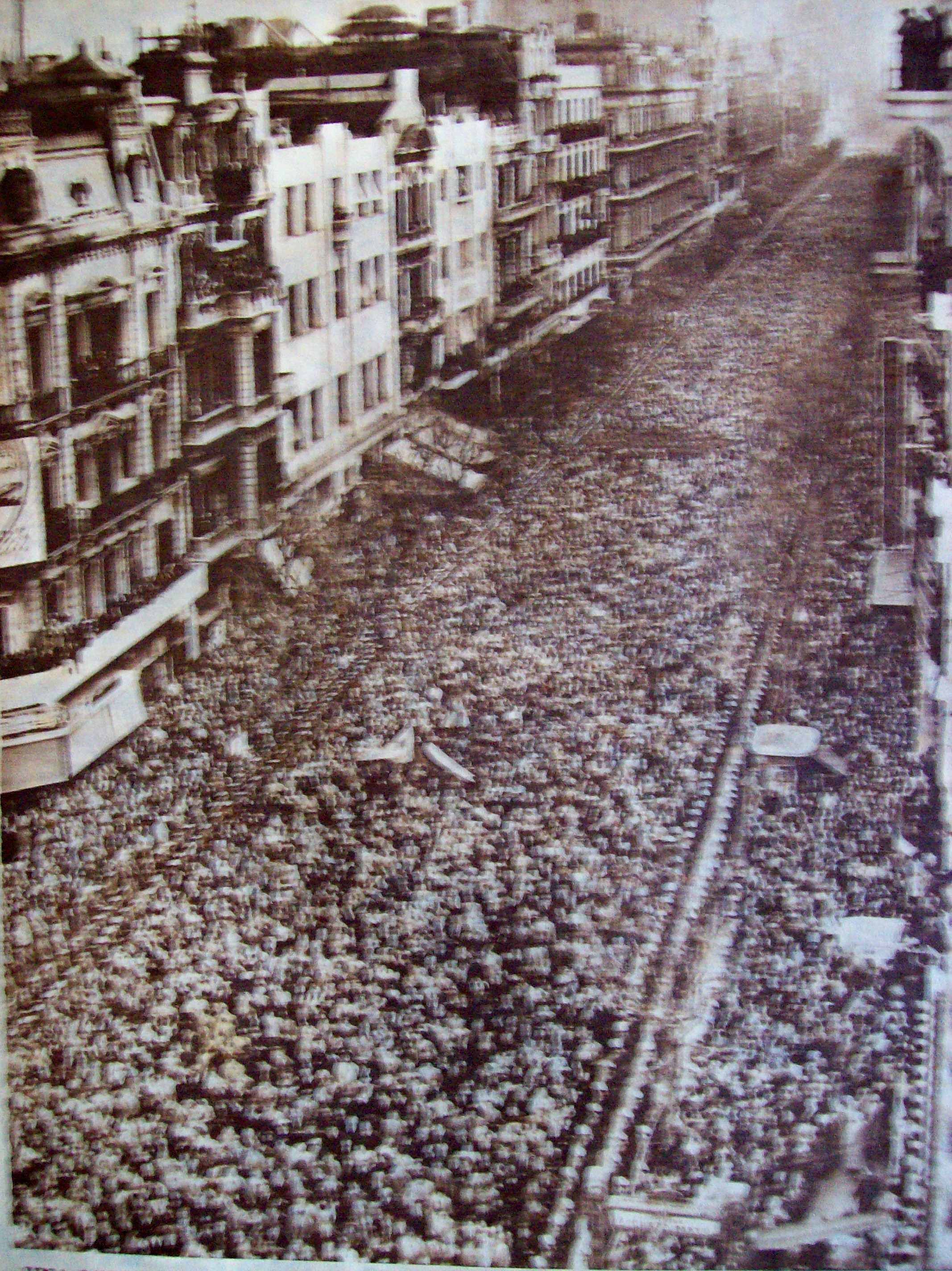 Imagen tomada de una foto de julio de 1952 del diario argentino La Prensa, mostrando el cortejo fúnebre de los restos de Eva Perón